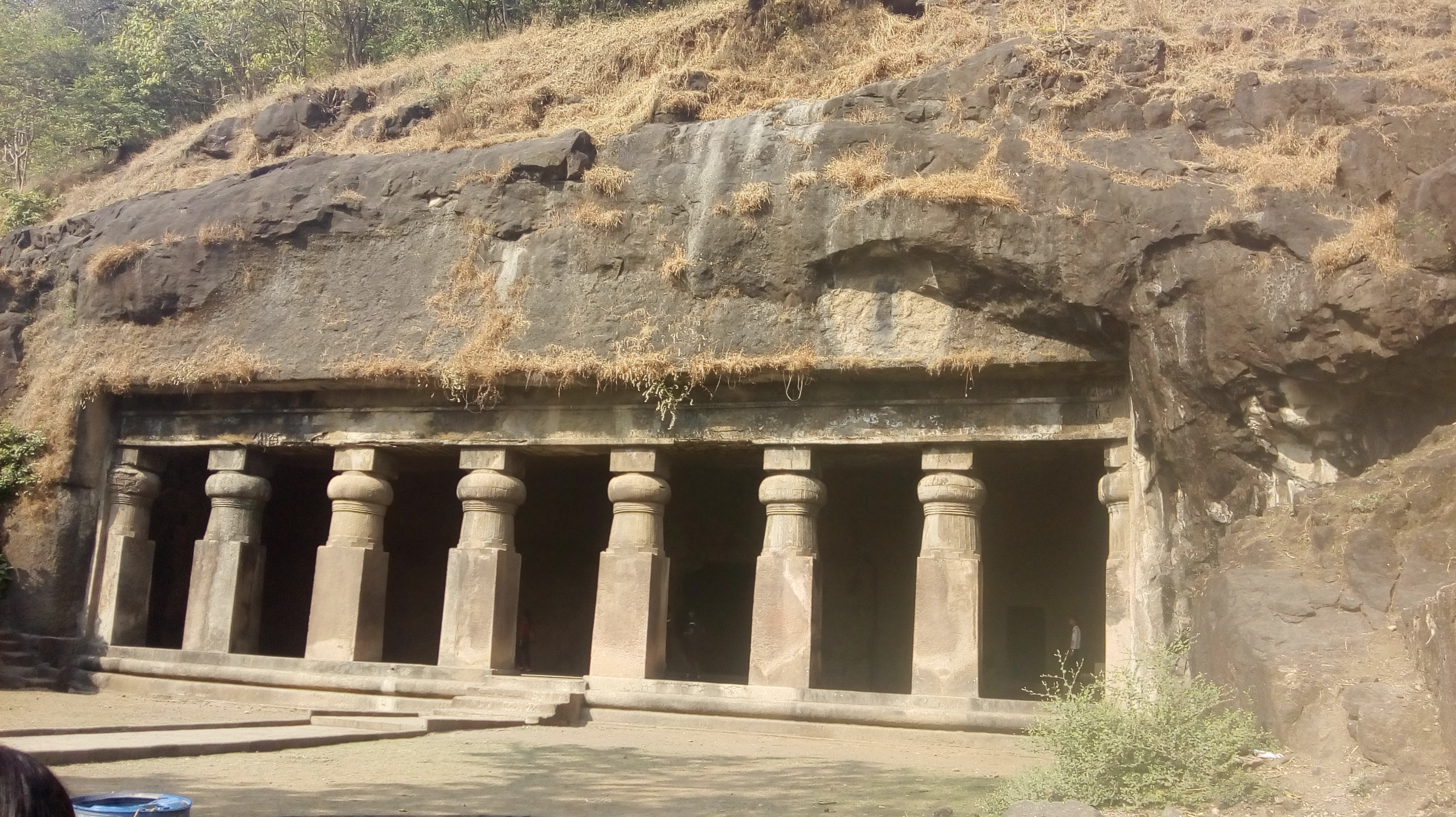 एलिफन्टा कॅव्हेस छायाचित्रे